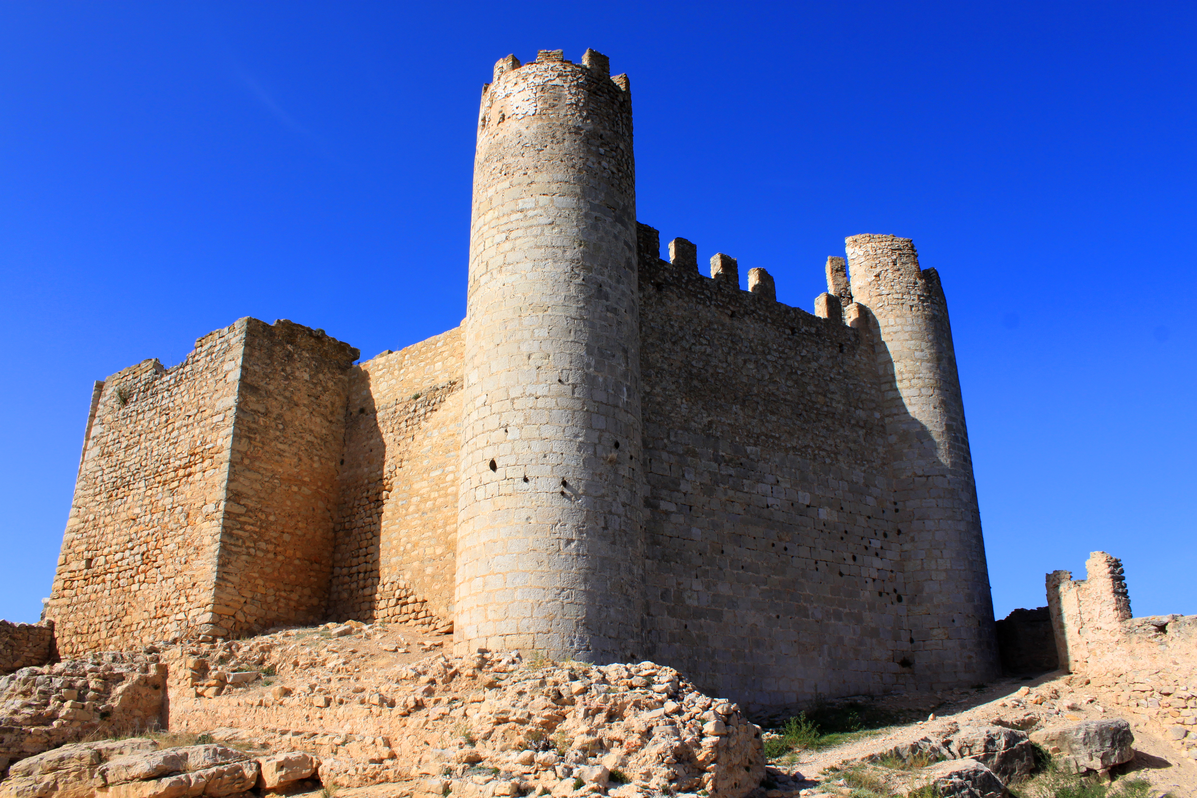 Castillo de Xivert. Vista exterior de la alcazaba desde el sur. Se observan a la derecha las dos grandes torres circulares de sillería construidas por la Orden del Temple en el siglo XIII. A la izquierda se aprecia la muralla sur y a los pies de la estructura los restos de los muros del basamento. Alcalá de Xivert, provincia de Castellón, Comunidad Valenciana, España.